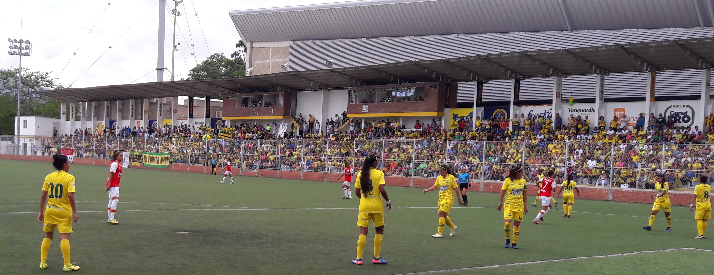 Cancha Marte - 4 de junio de 2017